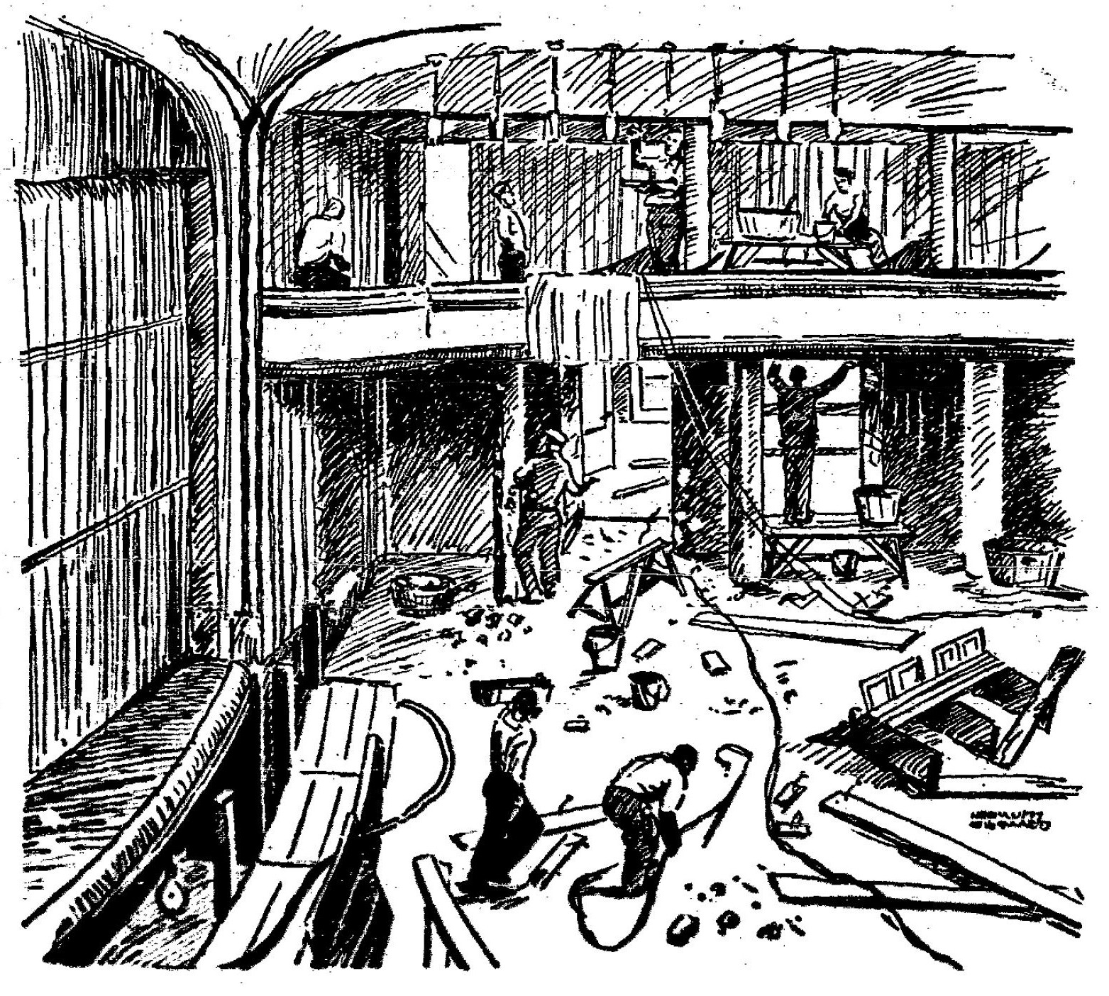 Illustration von Helmuth Ellgaard in Kieler Neueste Nachrichten vom 10. Juli 1935, Umbau des Kieler Stadttheaters.